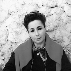 Romancière et nouvelliste